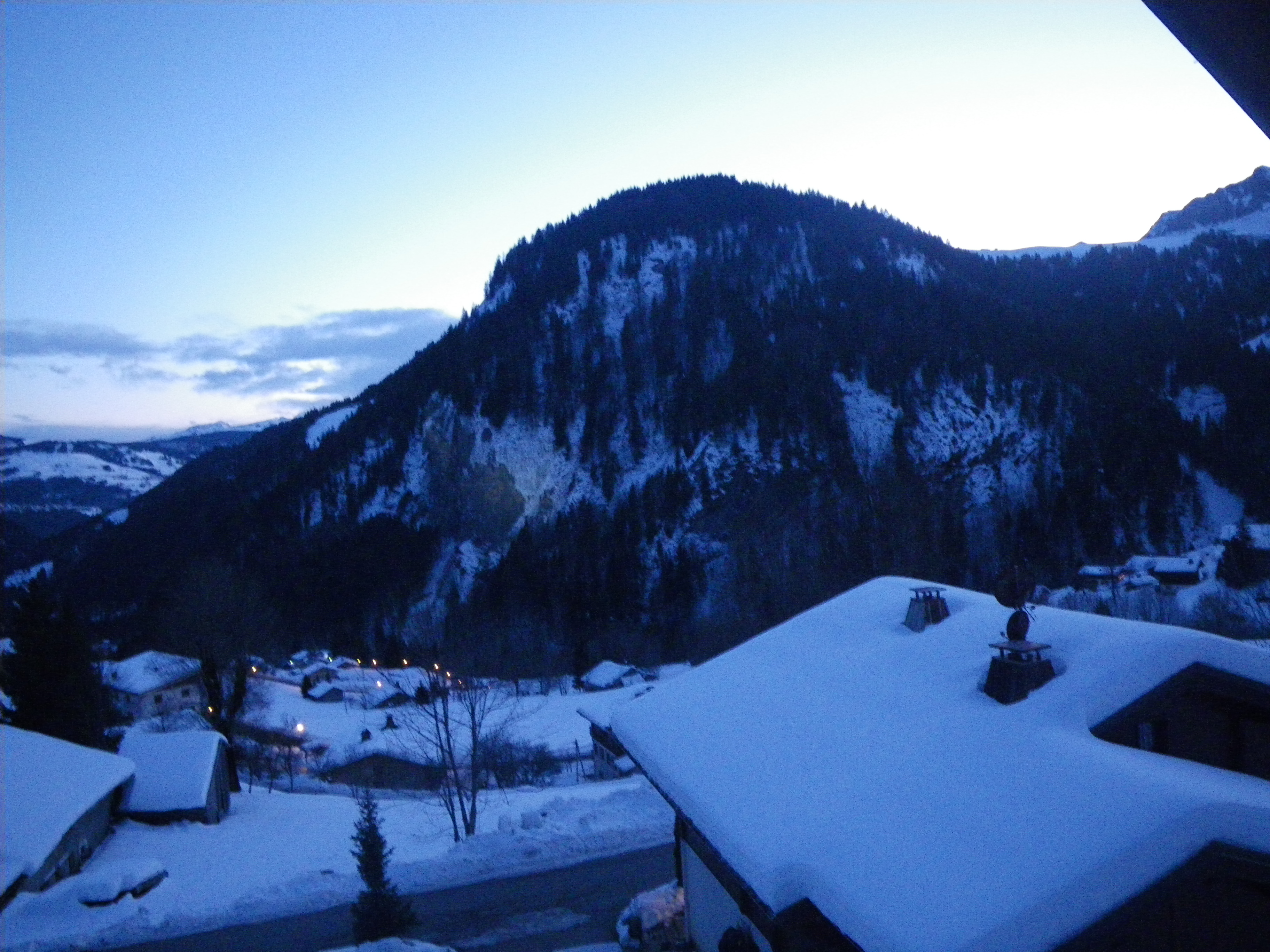 noel 2008